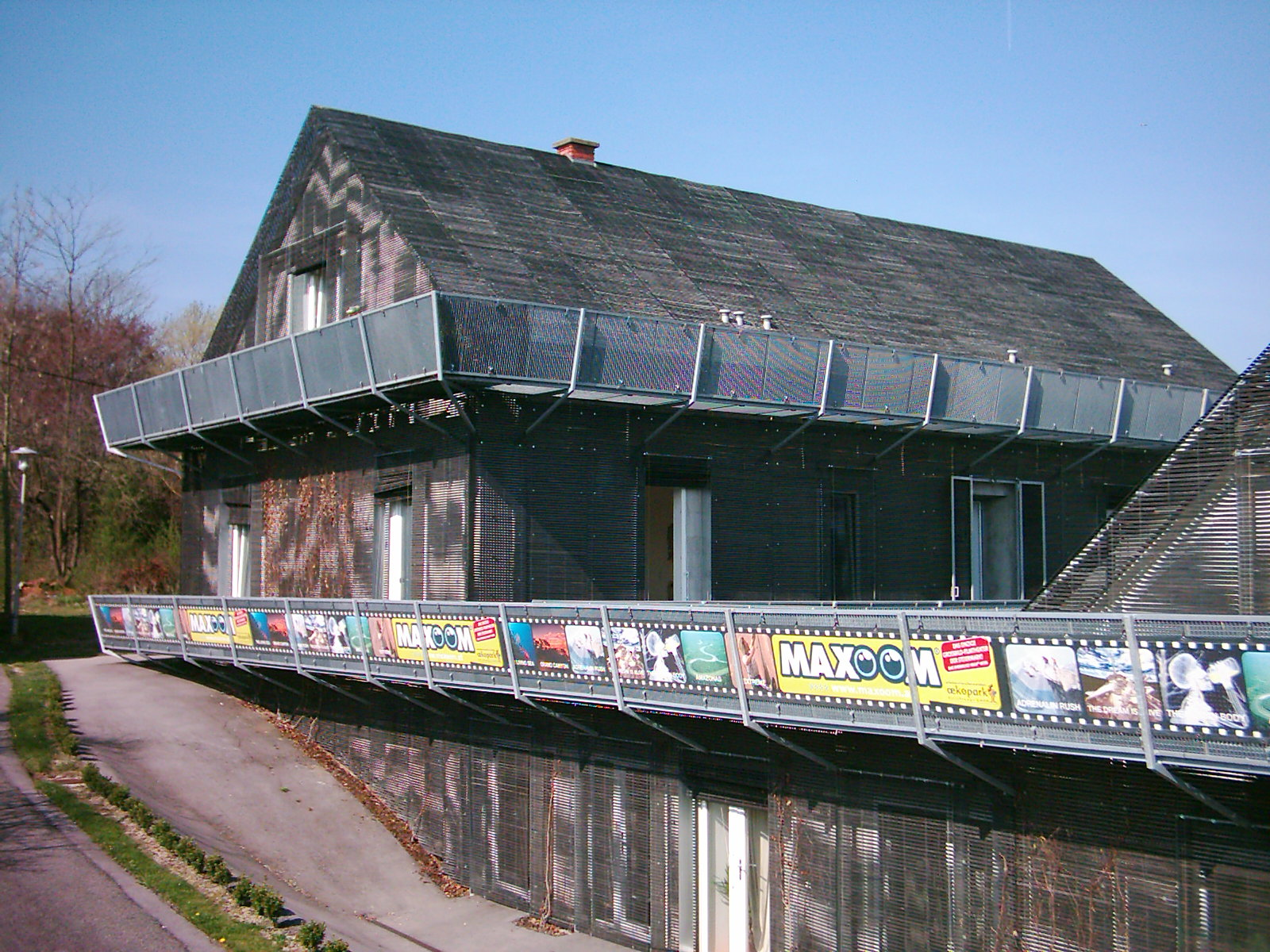 The residential building Black Treefrog in Bad Waltersdorf, Austria, higher part. Der höhere Teil des Wohnbaus Schwarzer Laubfrosch in Bad Waltersdorf